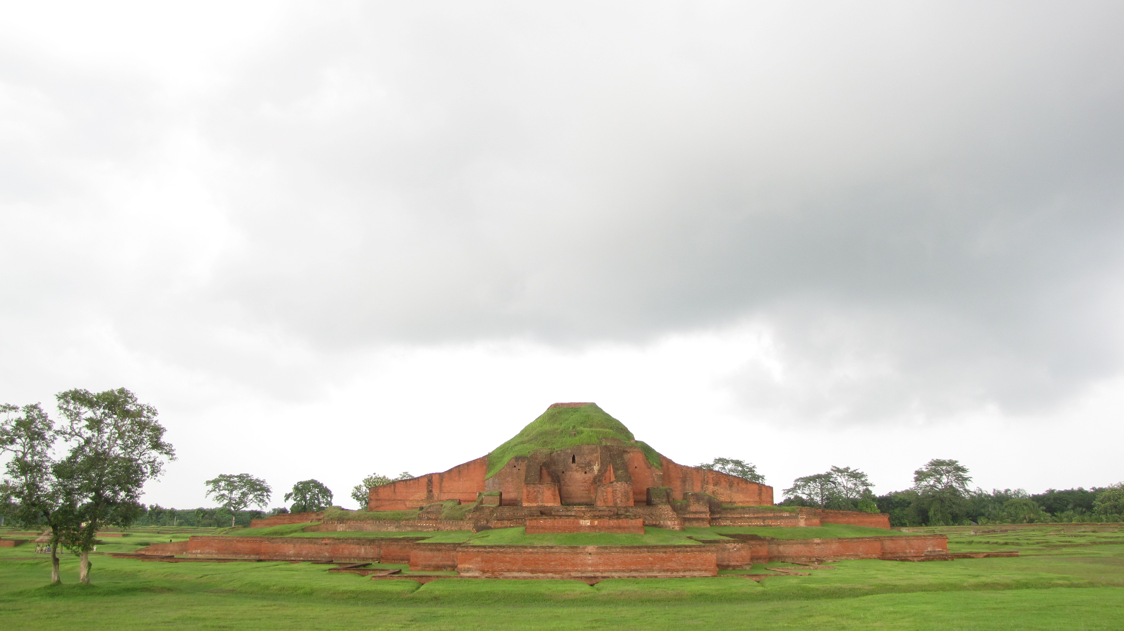 stupa, bangladesh